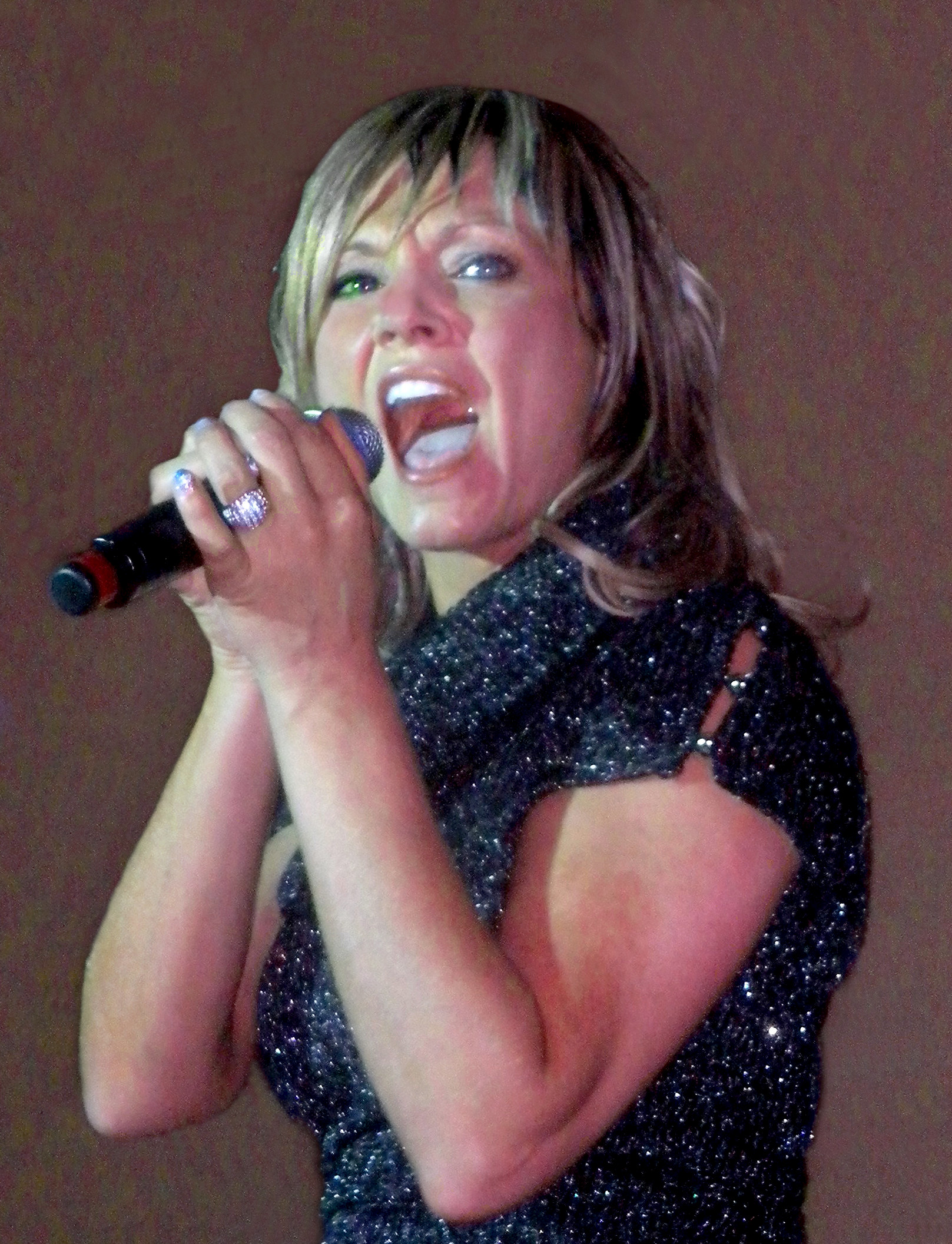 Laura Lynn, pseudoniem van Sabrina Tack (Ardooie, 18 juni 1976) is een Vlaamse zangeres uit West-Vlaanderen. In België staat ze ook wel bekend als de Schlagerkoningin. Zij is een populaire zangeres in België, Nederland en Zuid-Afrika.